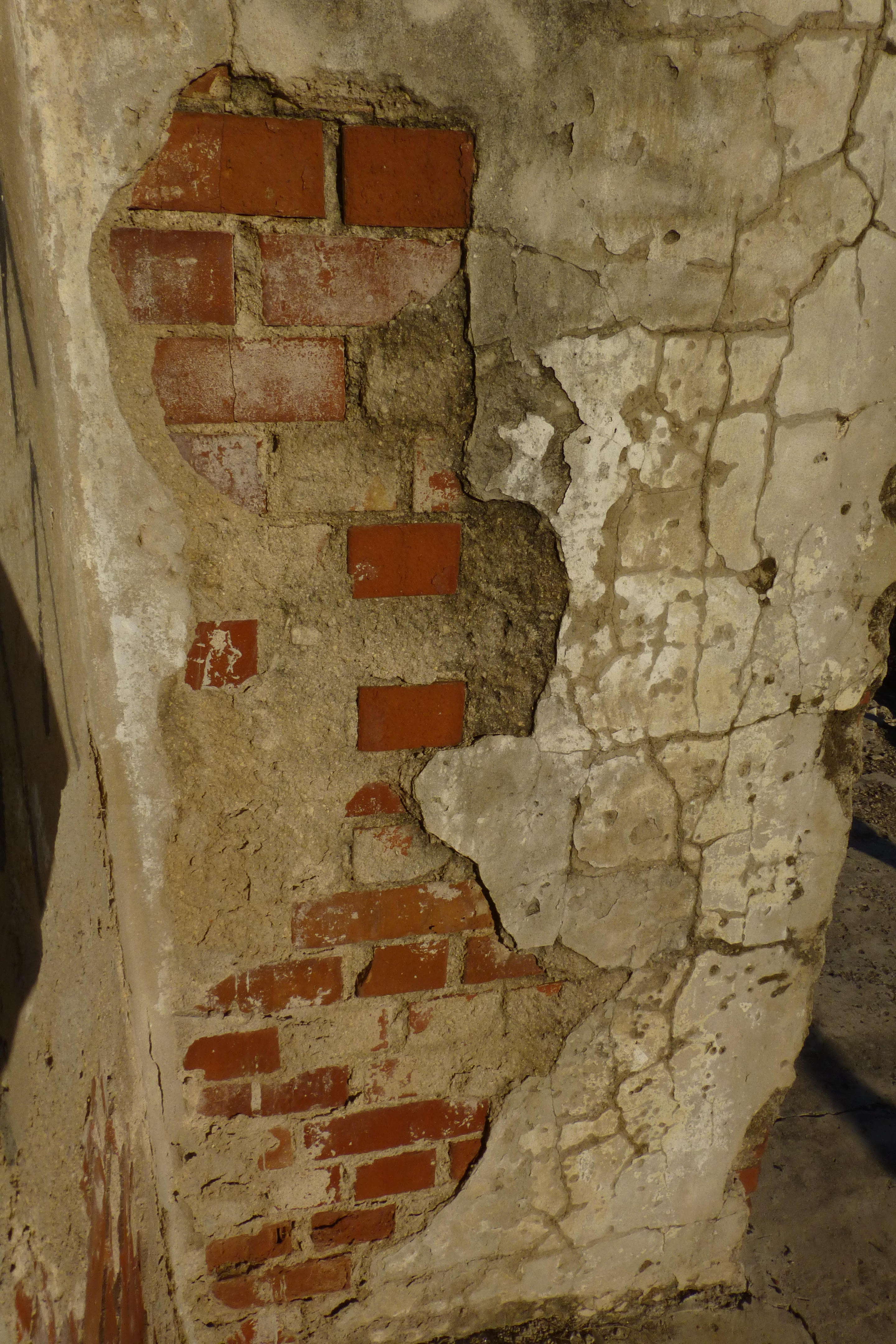 בית הקירור שימש את איכרי הכפר לאיחסון תפוחי אדמה שגידלו. הקיבולת היתה: 80 טון. בהמשך הושכר בית הקירור לשימושם של קיבוצי הסביבה תמורת תשלום. בימי מלחמת השחרור שימוש המקום לאיחסון נשק. בית הקירור אמור לעבור תהליך שימור ולהכיל בתוכו את ארכיון הישוב.